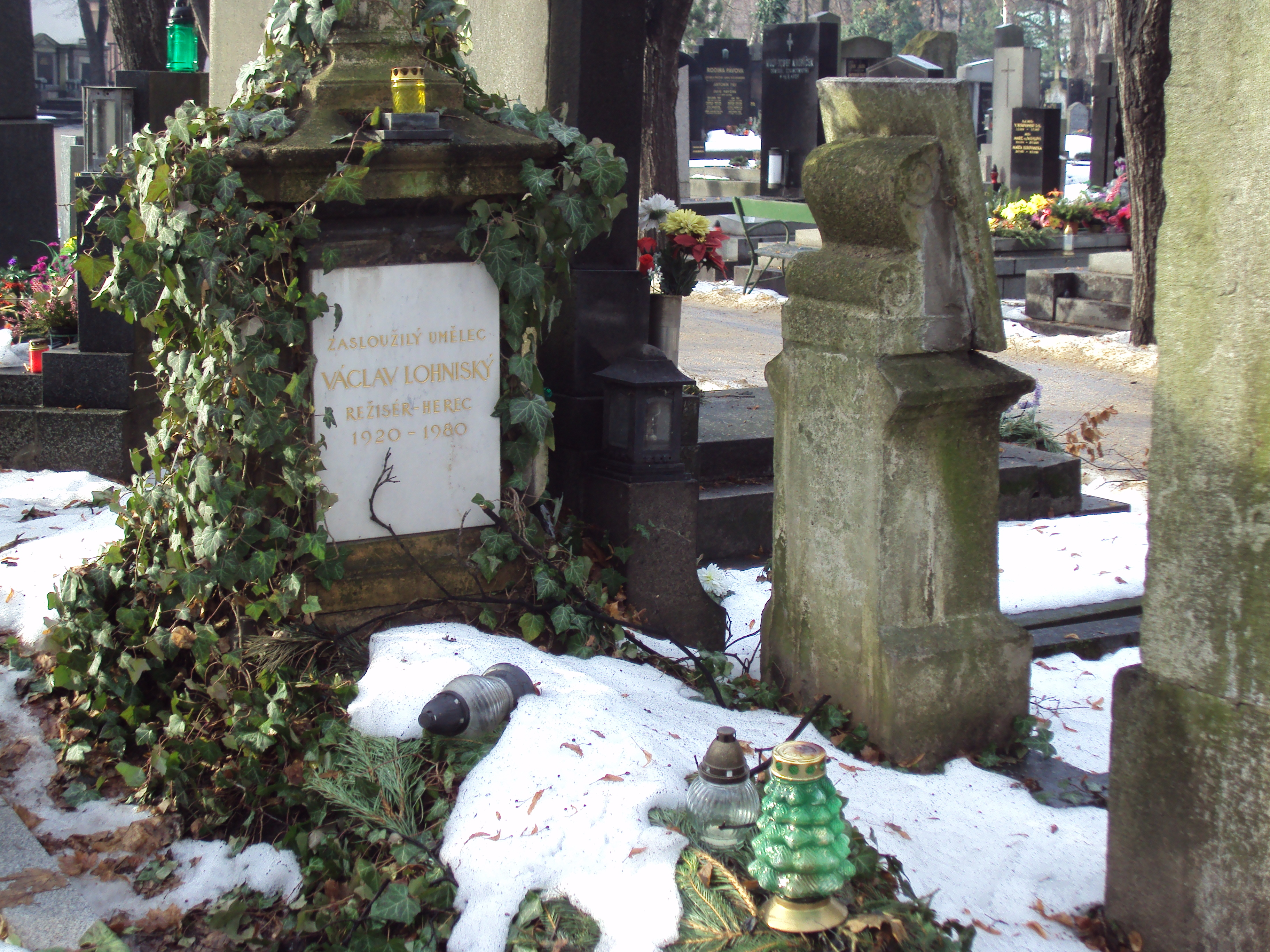 Hrob herce na Olšanech